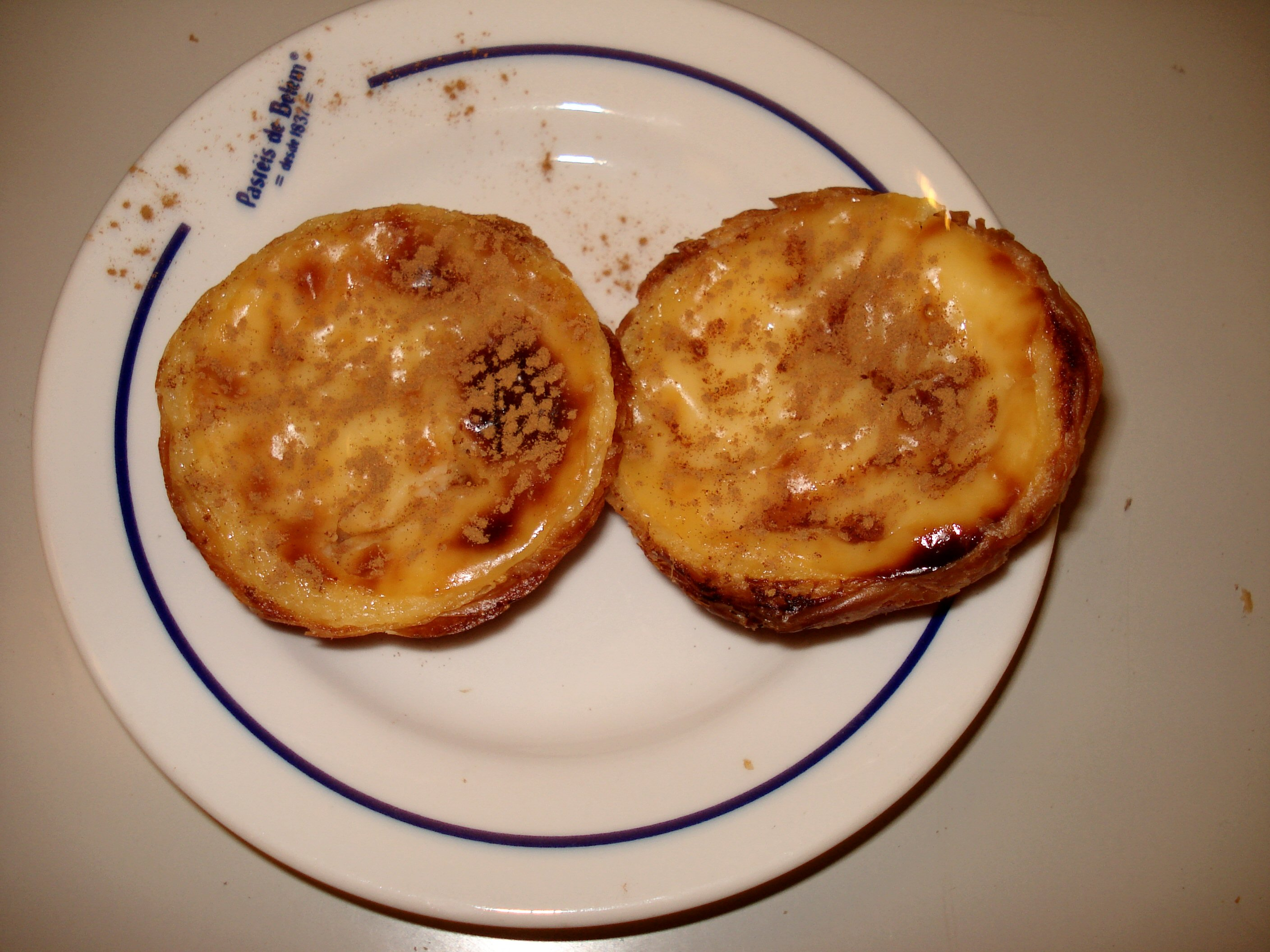 Eierpuddinggebäck der Fabrica dos Pasteis de Belem, welches nach den alten Rezepten der Mönche des Jeronimos Kloster zubereitet wird